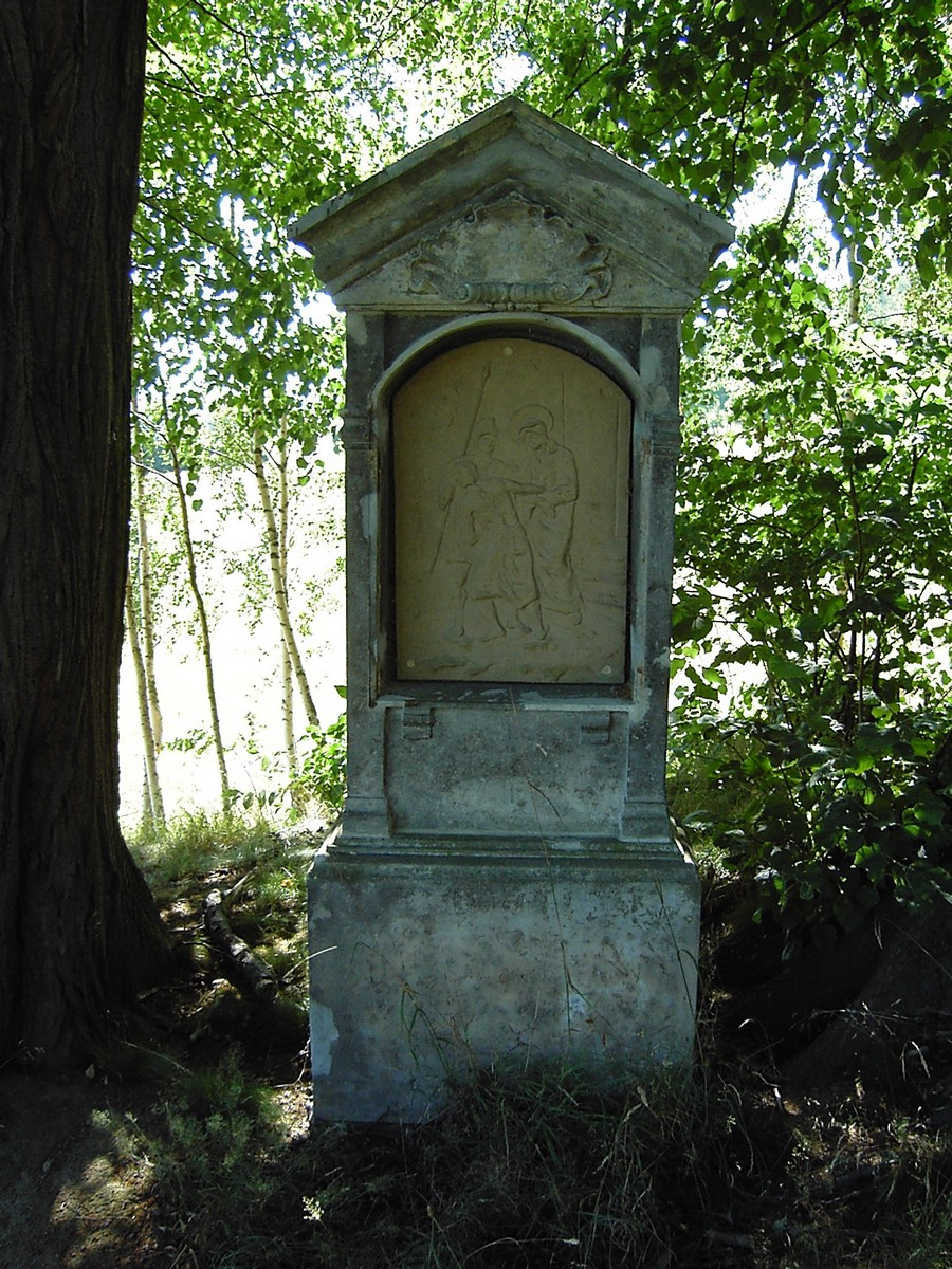 Křížová cesta ve Velkém Šenově, první zastavení